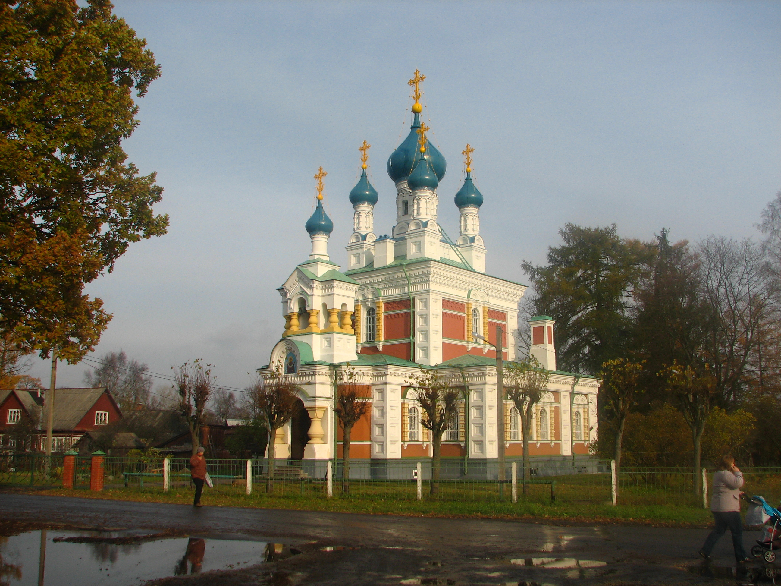 Церковь Покрова Божией Матери в Гатчине